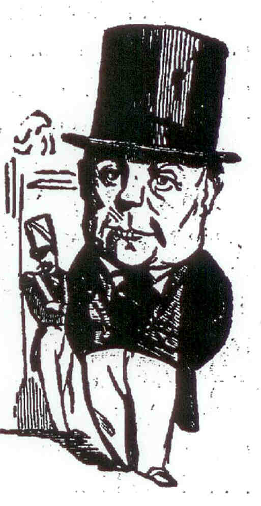 Portrait-charge du fondateur et propriétaire de célèbre Bal Bullier à Paris.